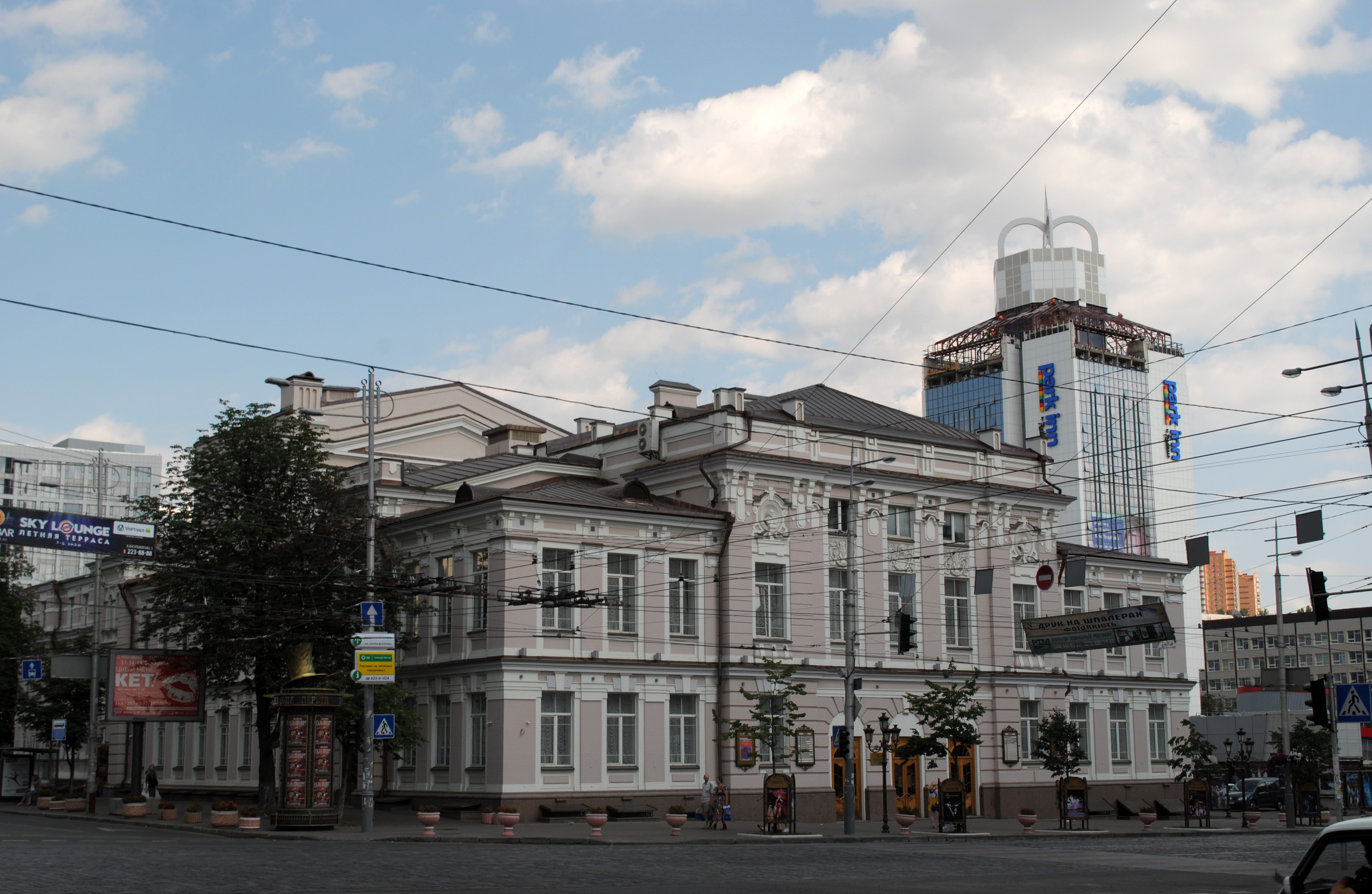 Будинок Троїцький народний, в якому мешкав і працював Садовський М. К.,театральний діяч, драматург, режисер; був перший стаціонарний український професійний театр, виступали різні театральні колективи; у 1905 р. були організовані перші профсоюзи у Києві, Київ, Червоноармійська вул., 53